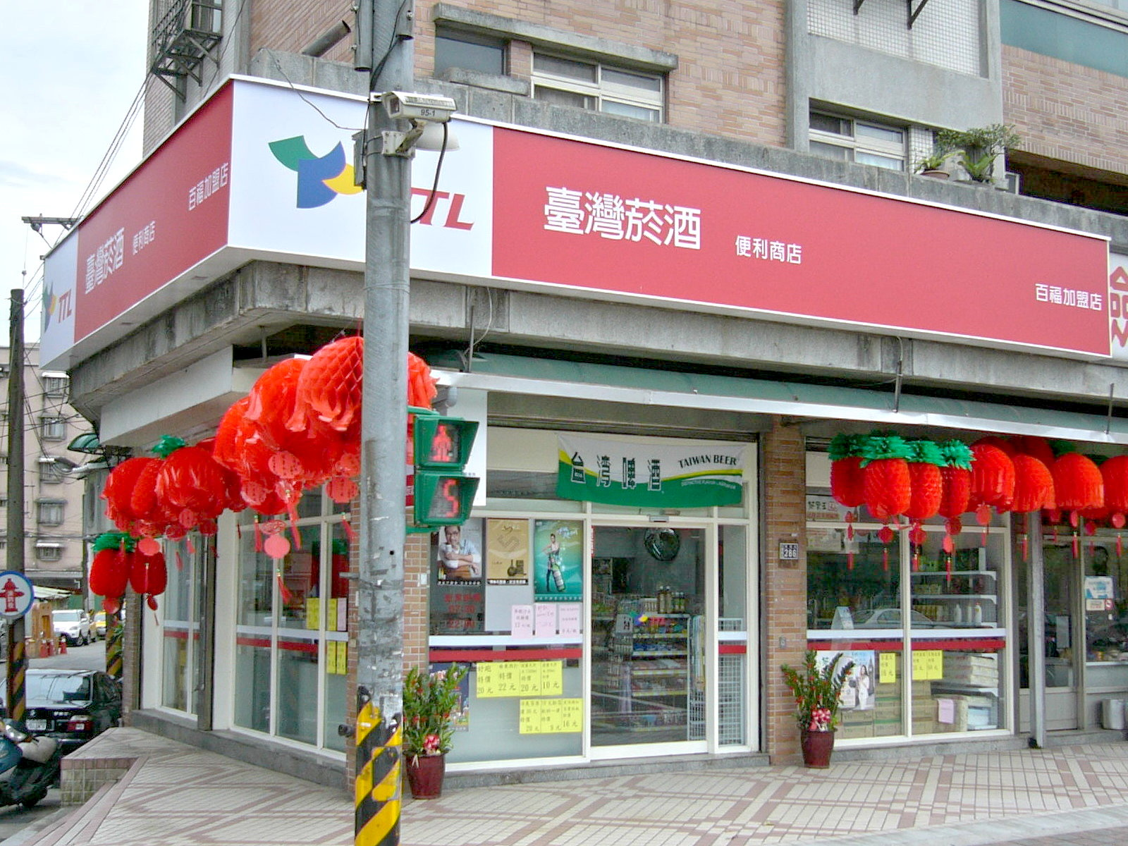 臺灣菸酒便利商店百福加盟店，位於基隆市七堵區實踐路286號1樓，2011年6月開幕，2014年2月21日搬遷至基隆市七堵區福二街215號1樓。